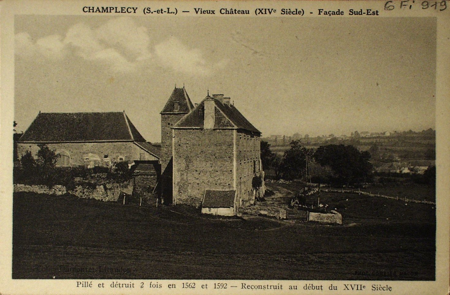 Vieux Château de Chanlecy de Champlecy Saône-et-Loire